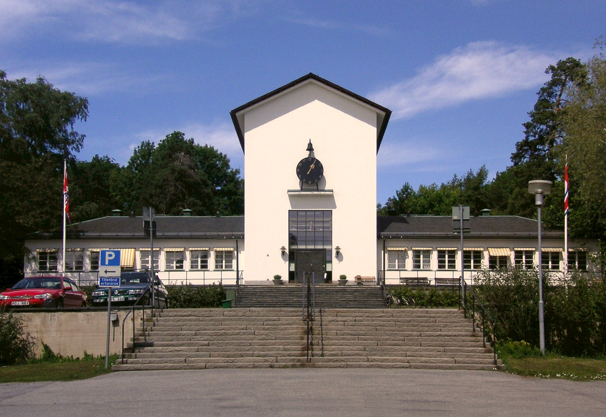 Frimurarebarnhuset i Blackeberg, Bromma, Stockholm